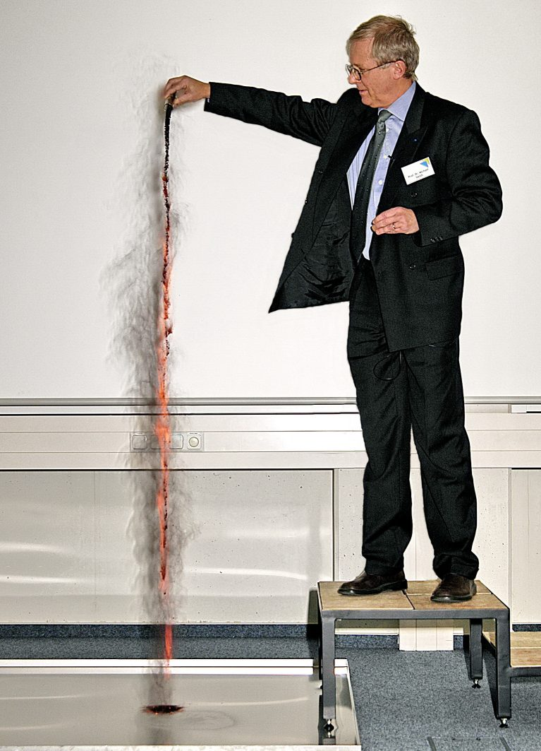 Michel Veith mit Eisennanopartikeln